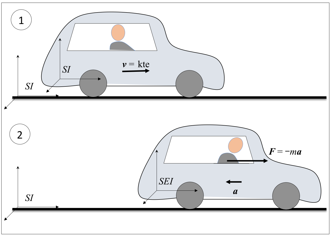 Balaztatzen ari den auto bateko erreferentzia-sistema ez-inertzialeko inertzia-indarraren eskema.